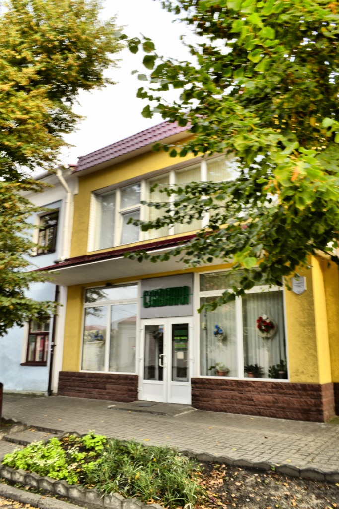 Беларуская (тарашкевіца): Гістарычны цэнтр г. Пінска: будынкі, збудаваньні, планіровачная структура, ландшафт і культурны пласт на тэрыторыі, абмежаванай з захадувул. Чарняхоўскага,з поўначы – вул. Завальнай, па мяжы дваровых тэрыторый дамоў № 1, 7,9, 11, 13, 19, 25, 27 па гэтай вуліцы, вул. Кірава, уключаючы дваровыя тэрыторыі дамоў № 1, 13 па вуліцы Кірава, з усходу – вул. Савецкай, у тым ліку дома № 5 па вул. Іркуцка-Пінскай Дывізіі, дома № 2 па вул. Кулікова, дома № 3 на пл. Кастрычніка, памяжы дваровых тэрыторый забудовы няцотнага боку дамоў № 1, 3па вул. Кіеўскай, да перакрыжаваньняз вул. Альхоўскіх, ад перакрыжаваньня з вул. Дняпроўскай Флятыліі,па вул. Дняпроўскай Флятыліі, уключаючы дваровыя тэрыторыі дамоў№ 39, 41 гэтай вуліцы, з поўдня —левым берагам р. Піна да перасячэньня з вул. Чарняхоўскага. г. Пінск This is a photo of Belarusian heritage monument. Reference number: 112Е000529 ( WLM)